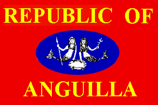 Flag_of_Anguilla (1967)